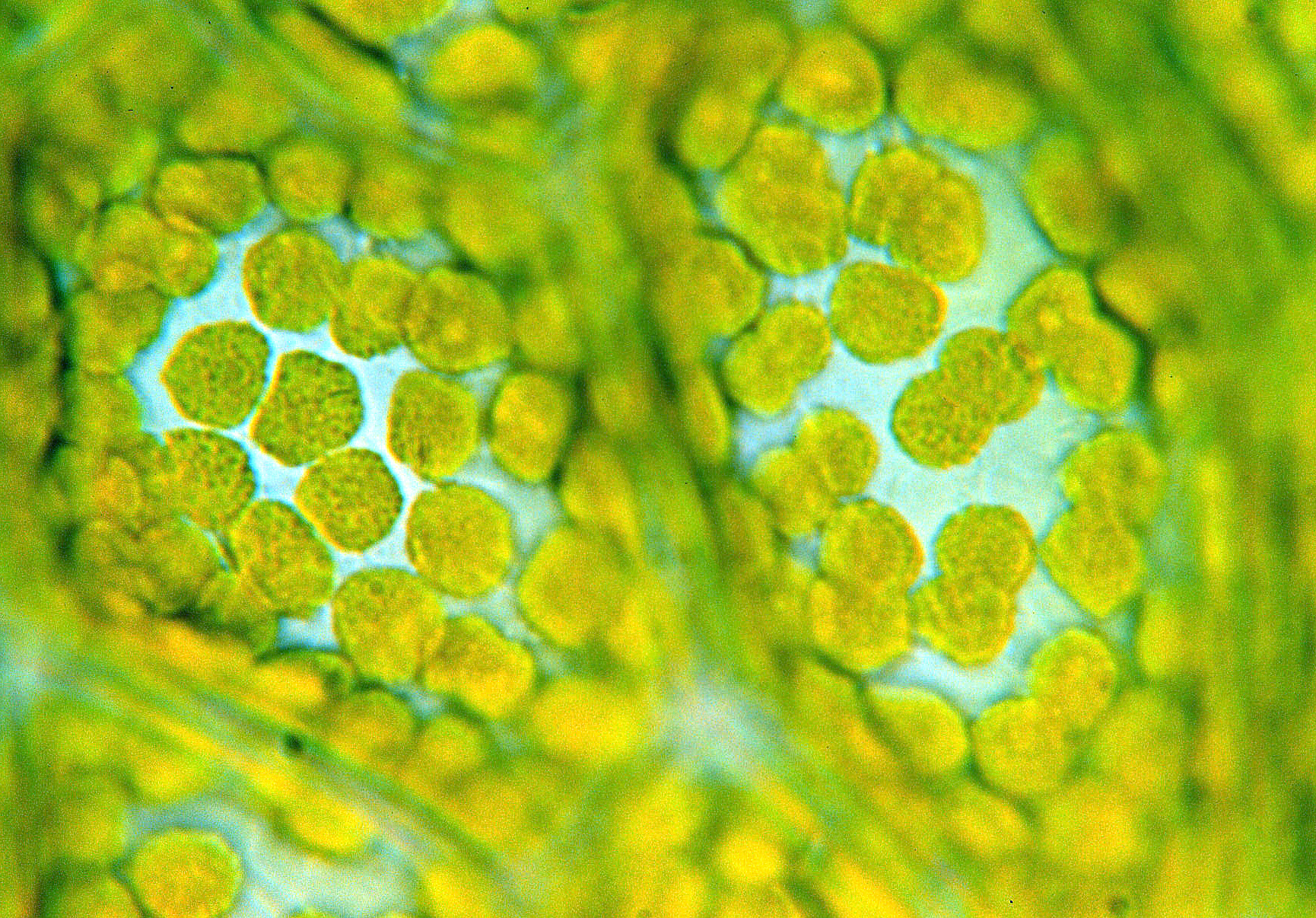 Chloroplasten in einer Blattzelle von Mnium stellare. Zur Bezeichnung einzelner Elemente den Mauszeiger über das Bild bewegen (Notizfunktion).